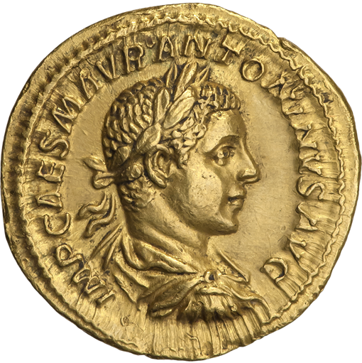 Ауреус. Элагабал. Ок. 218—219 гг. (аверс). Надпись IMP CAES M AVR ANTONINVS AVG. Бюст Элагабала в плаще, вправо; на голове лавровый венок.